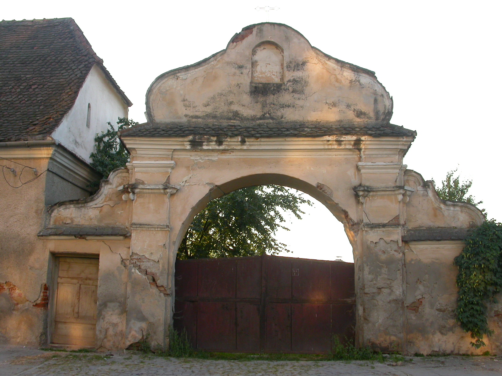 Mănăstirea Minoriților, sec. XVIII - XX